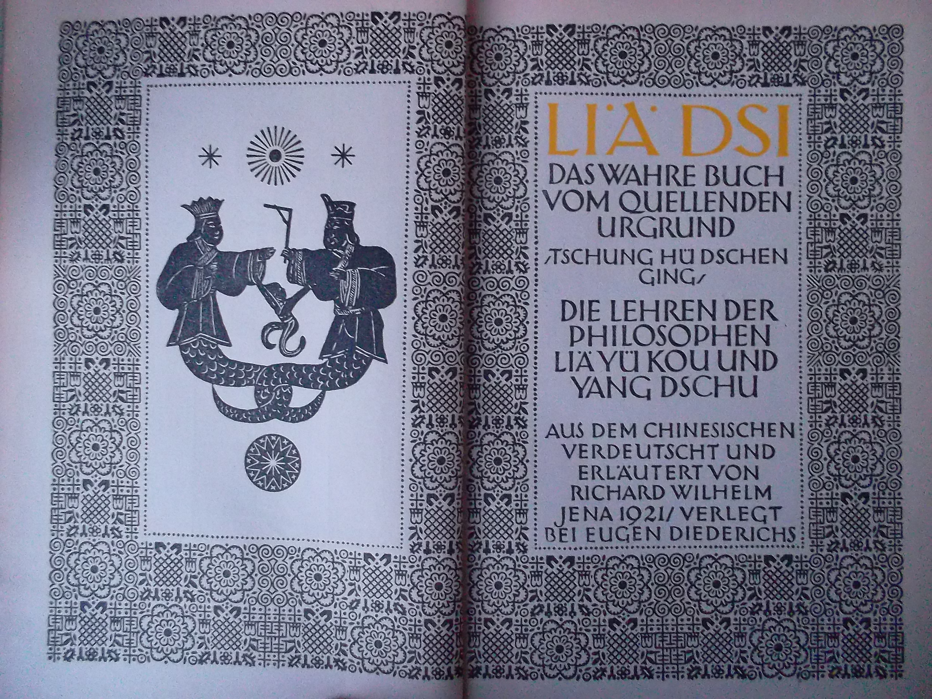 Liä Dsi, Das wahre Buch vom quellenden Urgrund, Tschung Hü Dschen Ging, Die Lehren der Philosophen Liä Yü Kou und Yang Dschu, Übersetzung von Richard Wilhelm, Eugen Diederichs Verlag, Jena, 1921. Die linke Seite zeigt Fu Hi und Nü Wa (vgl. Erklärungen zu Buch II, Abschnitt 18)